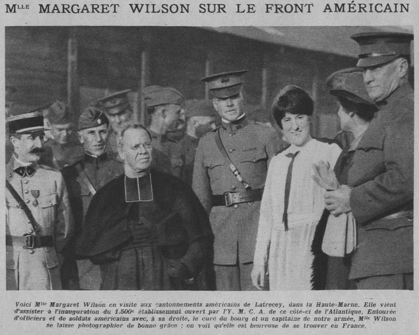 Margareth Wilson visitant le camp YMCA de Latrecey (Haute Marne) en 1918, publication du Le Pays de France N°218, page 10.